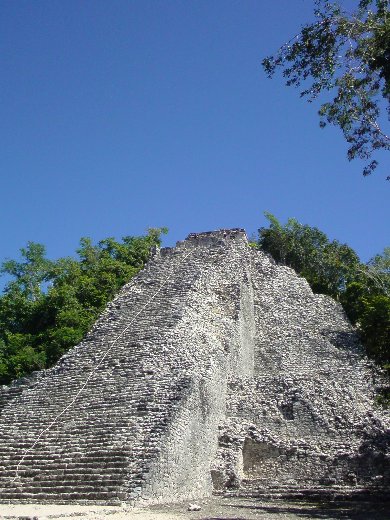 Coba Mayan ruin